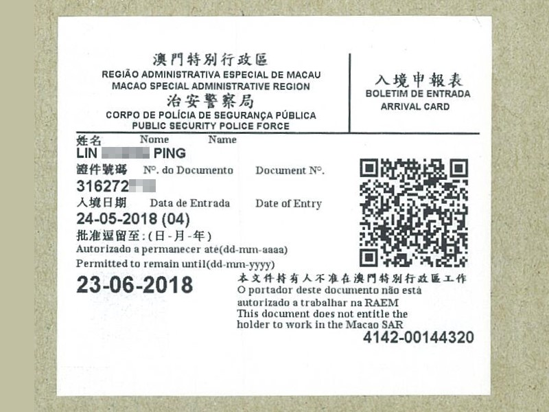 中文（台灣）: 澳門特別行政區治安警察局入境申報表，2018年5月24日以熱感應紙印製。